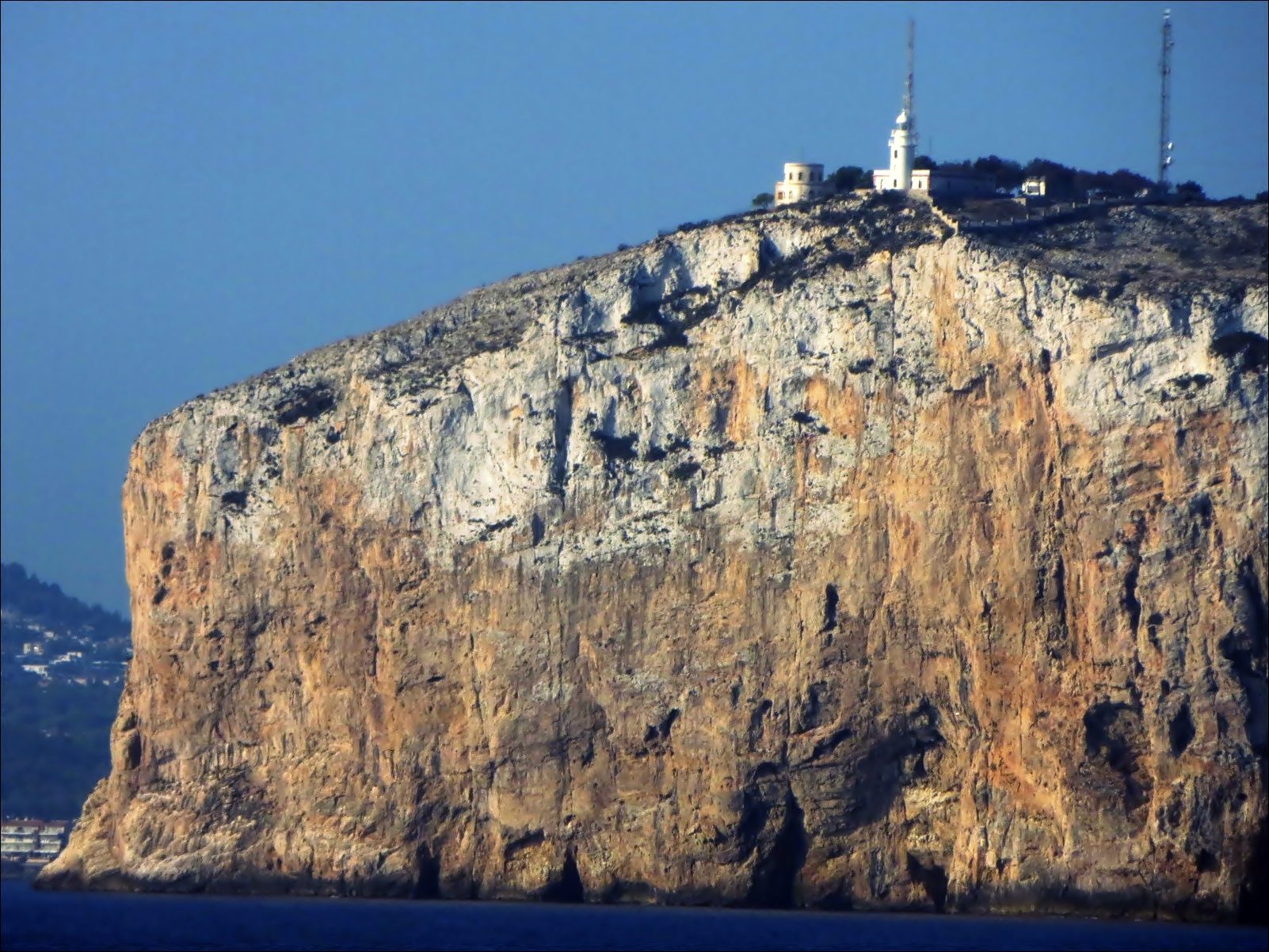 Cabo de San Antonio desde el mar